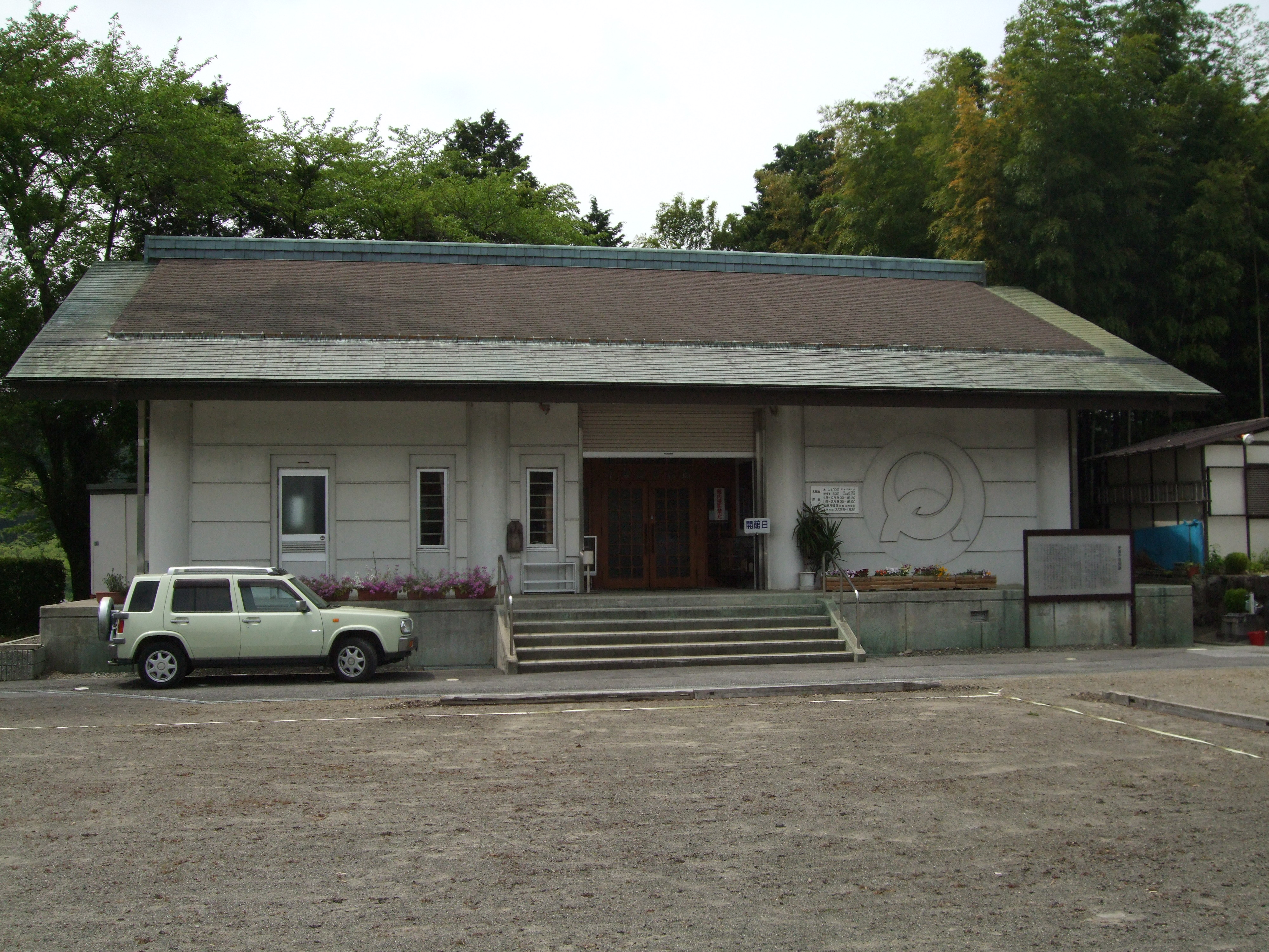 Fuwanoseki shiryokan